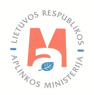 Aplinkos ministerijos logotipas